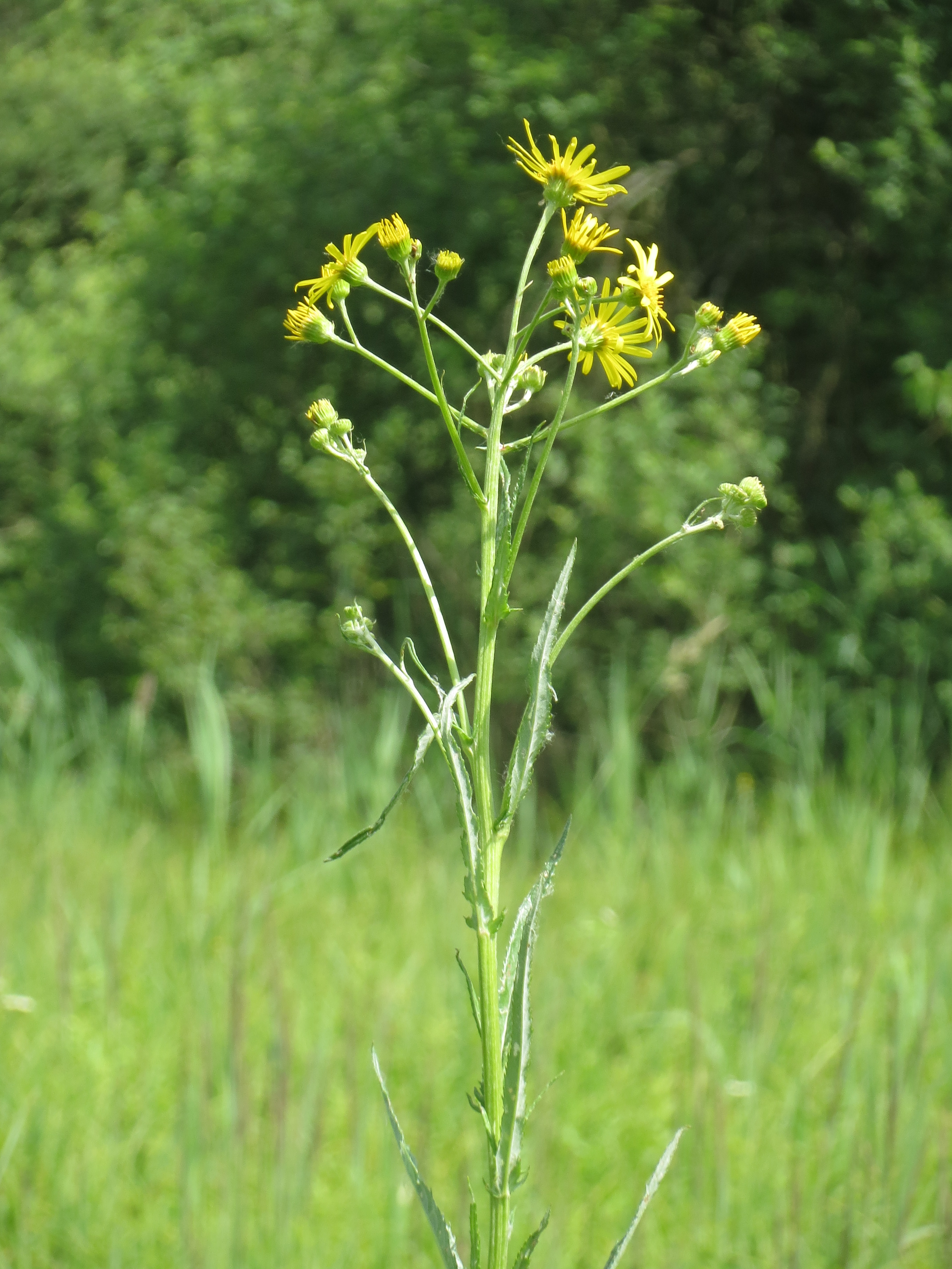 Sumpf-Greiskraut (Jacobaea paludosa) im Naturschutzgebiet Schwetzinger Wiesen-Riedwiesen